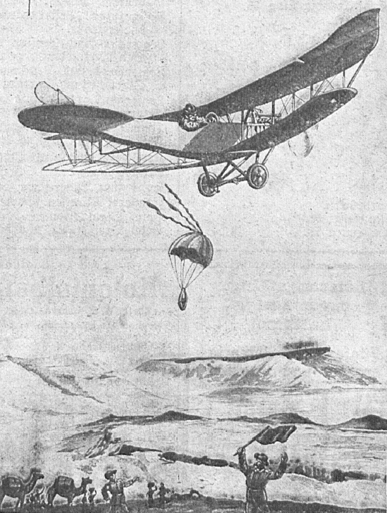 Zustellung der Post mit dem Flugzeug durch Bruno Büchner in Deutsch-Südwestafrika, Zeichnung aus dem Jahr 1914